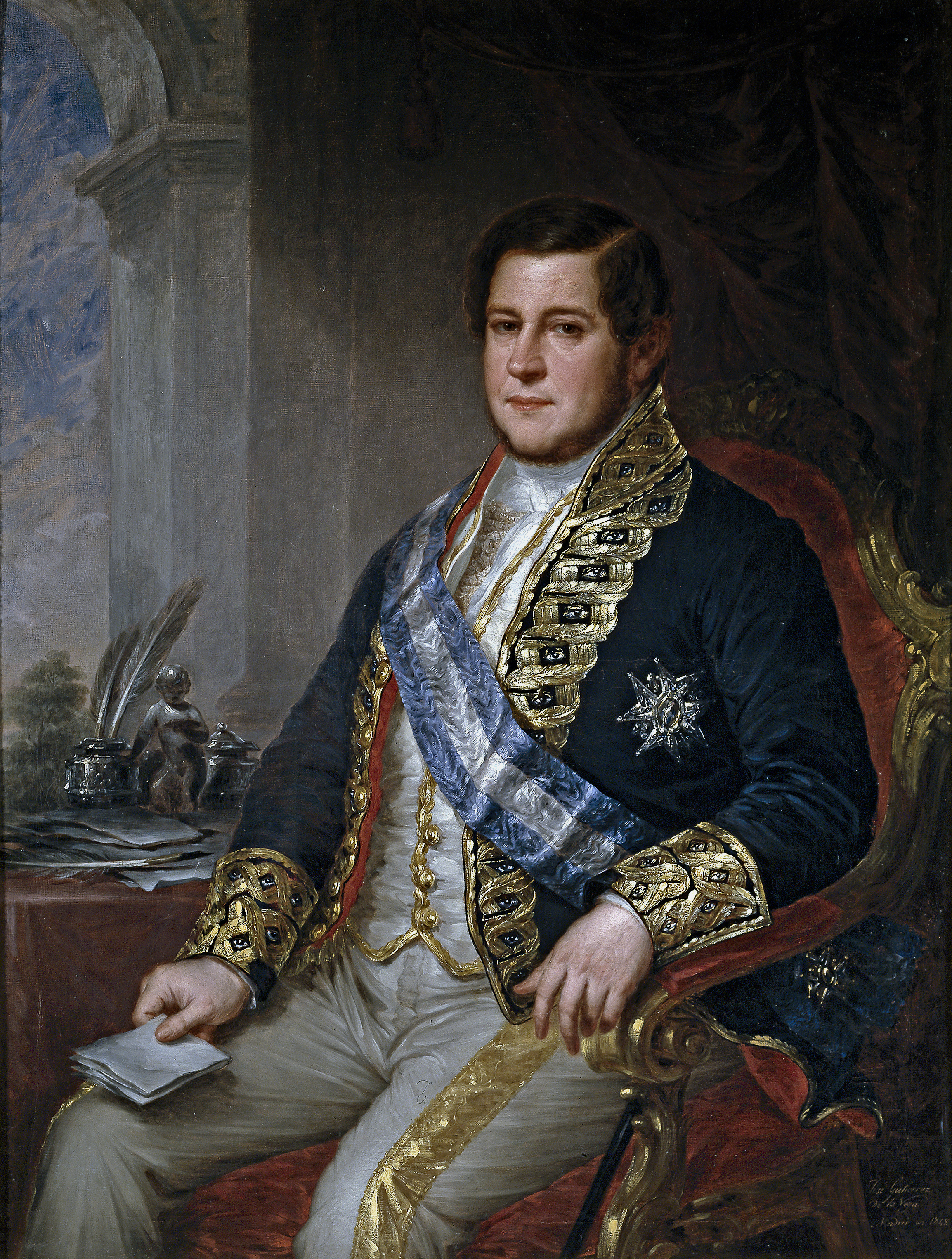 Retrato del político español Juan Bravo Murillo (1803-1873).